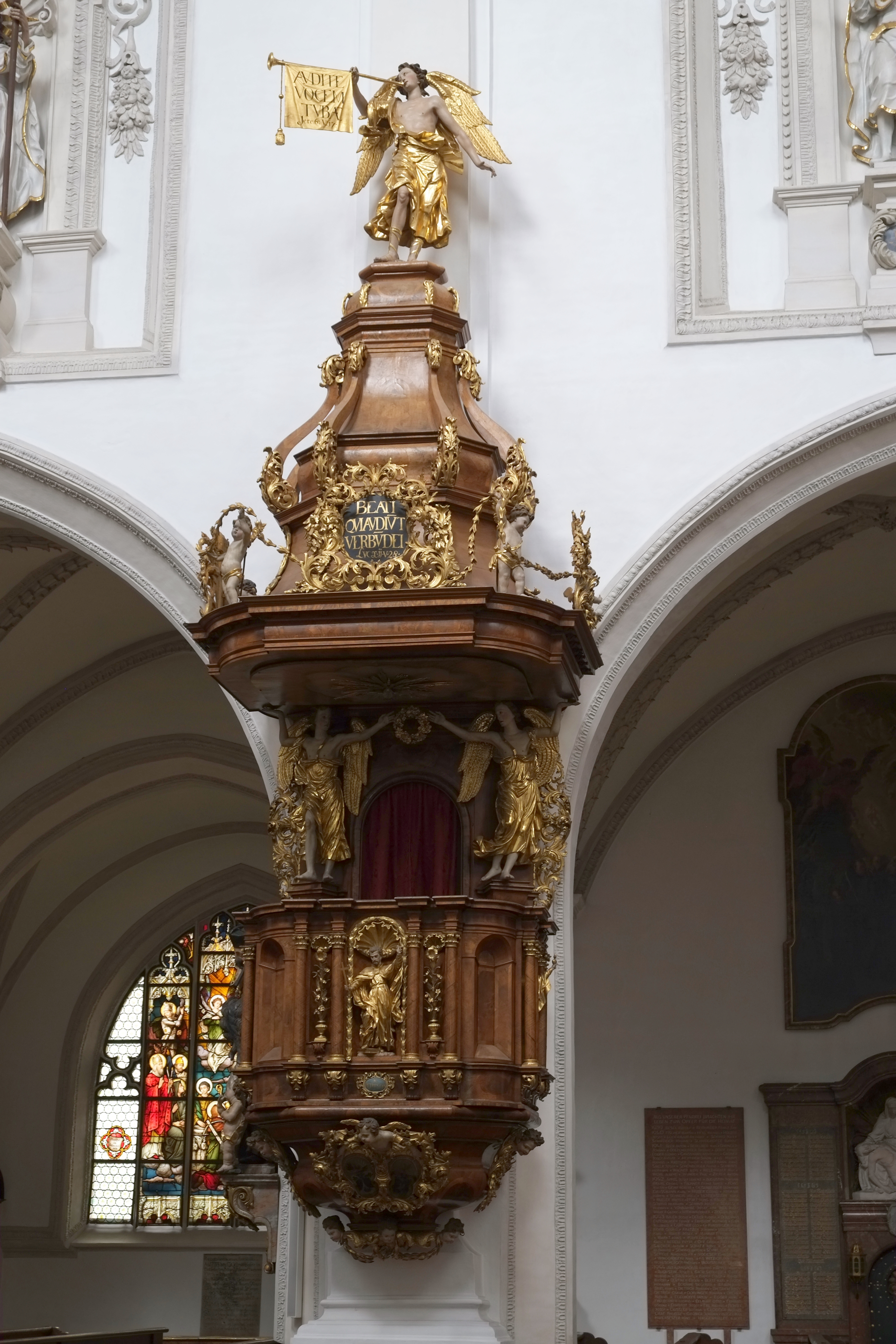 Stadtpfarrkirche Mariä Himmelfahrt in Landsberg am Lech (Bayern, Deutschland)